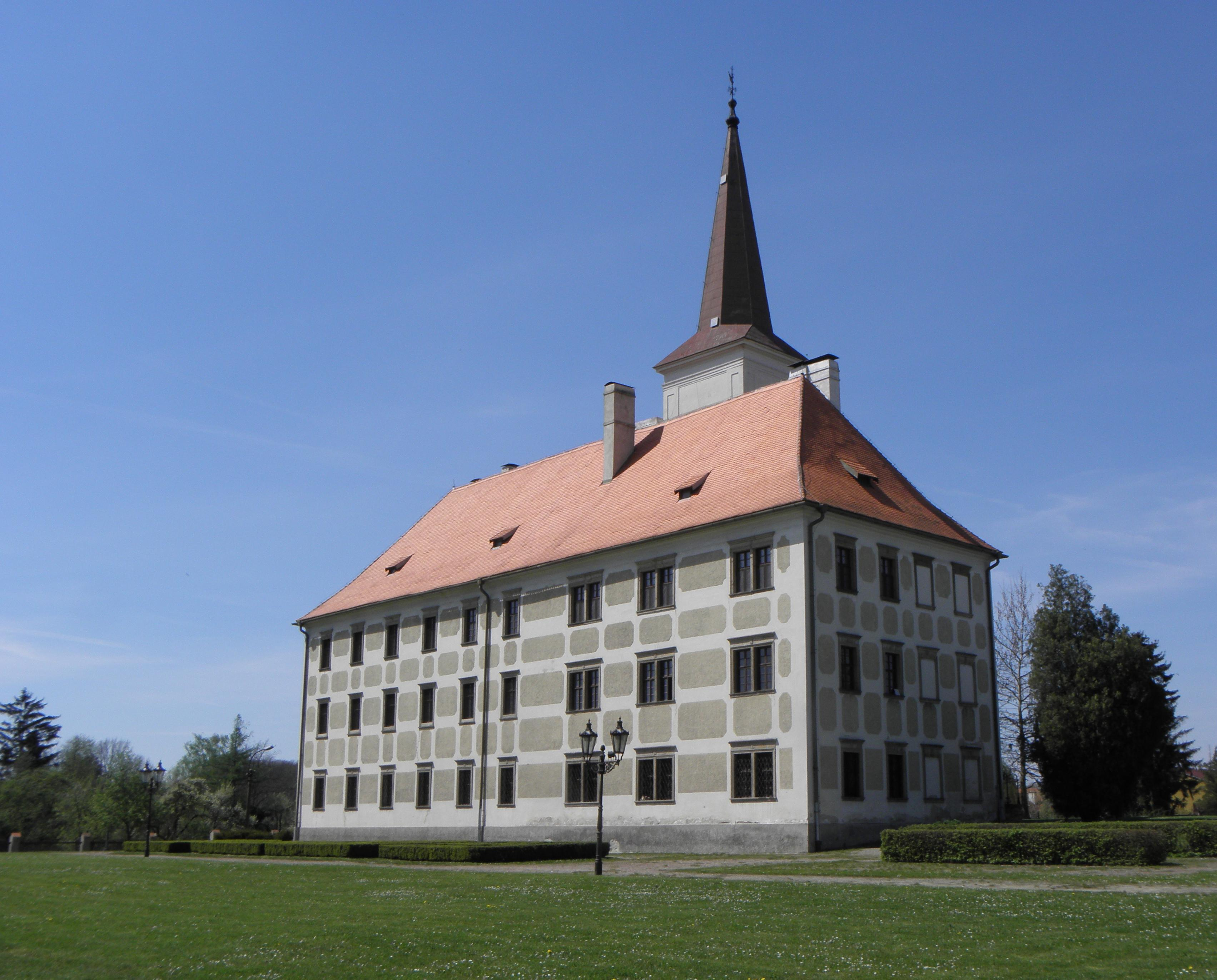 Zámek ve Chropyni, zadní trakt